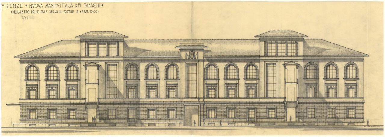 Prospetto dello Stabilimento Nuova Manifattura Tabacchi di Firenze (AS Terni, Archivio Cesare Bazzani, 1928)